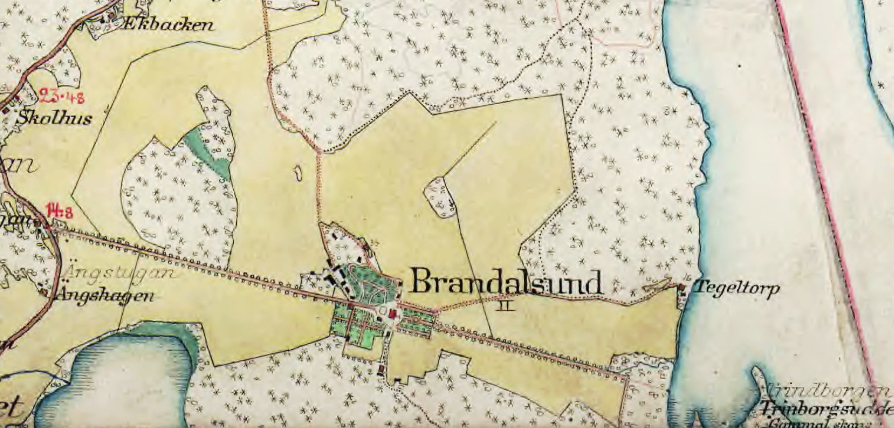 Del av Häradsekonomiska kartan som visar Brandalsunds huvudbyggnad och allé